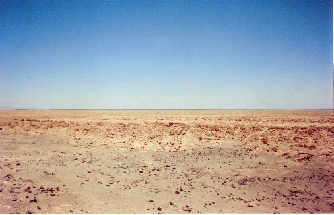 Desierto atacama in Chile.